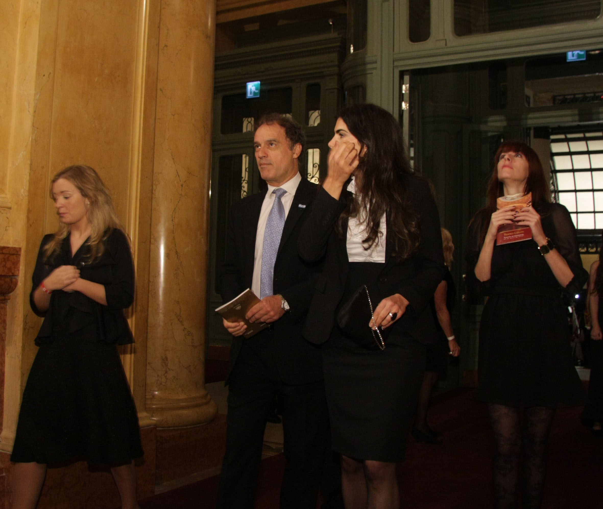 Gala de reapertura del Teatro Colón. Llegada de Aníbal Ibarra.